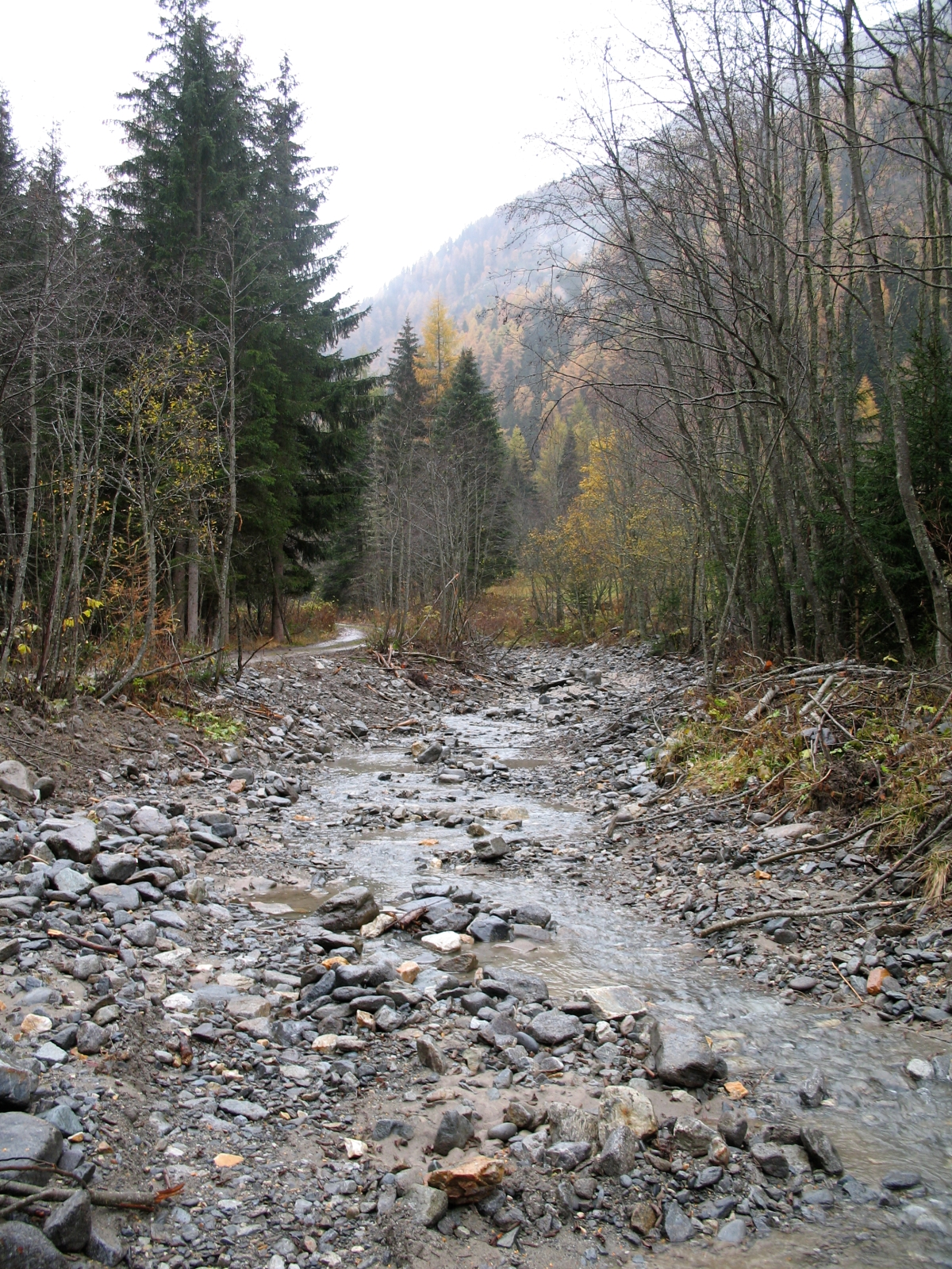 Der Faggenbach. Ca. 5km unterhalb des Gepatschspeichers.